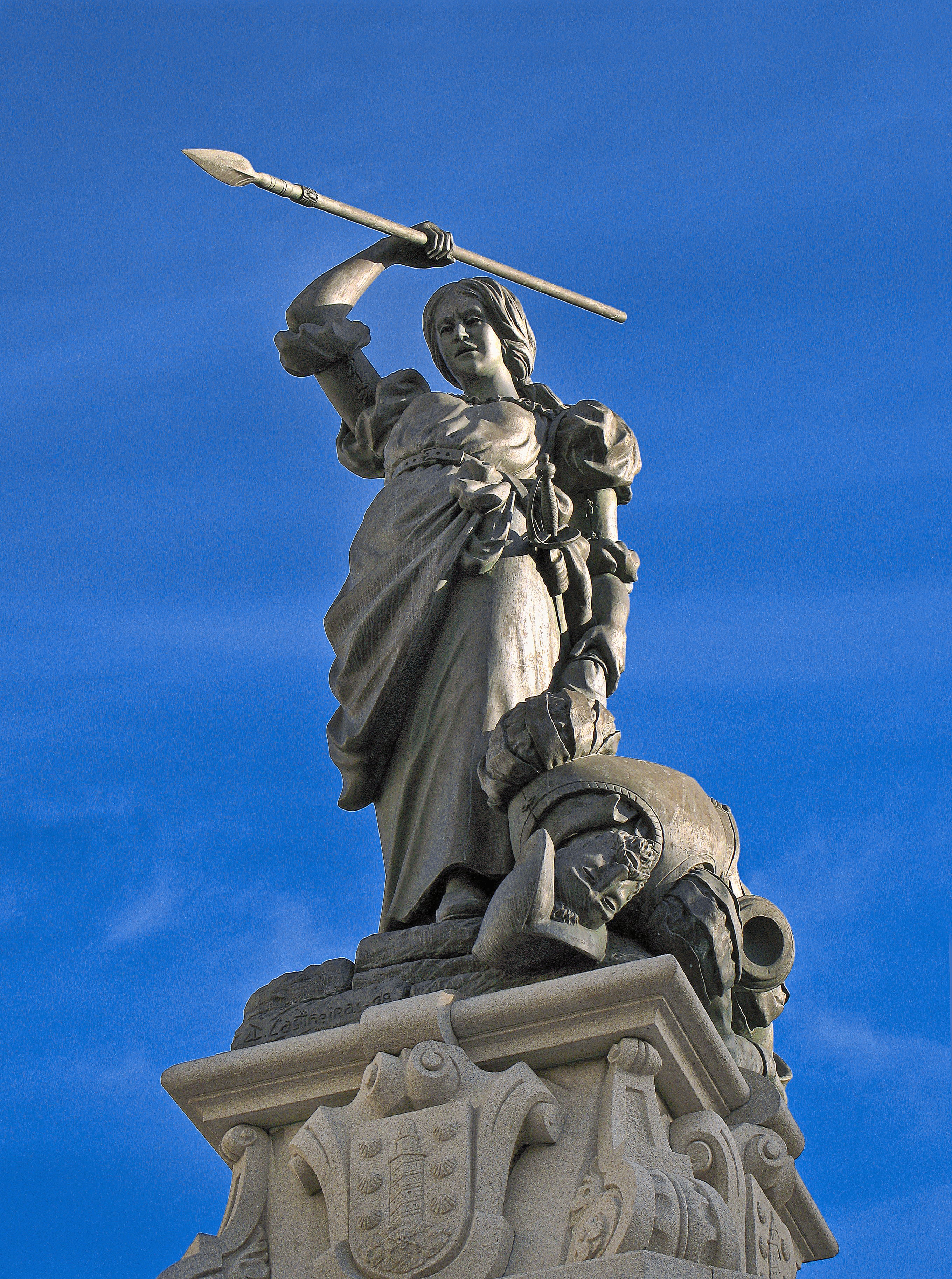 2008. Estatua de María Pita na Coruña (Galiza)